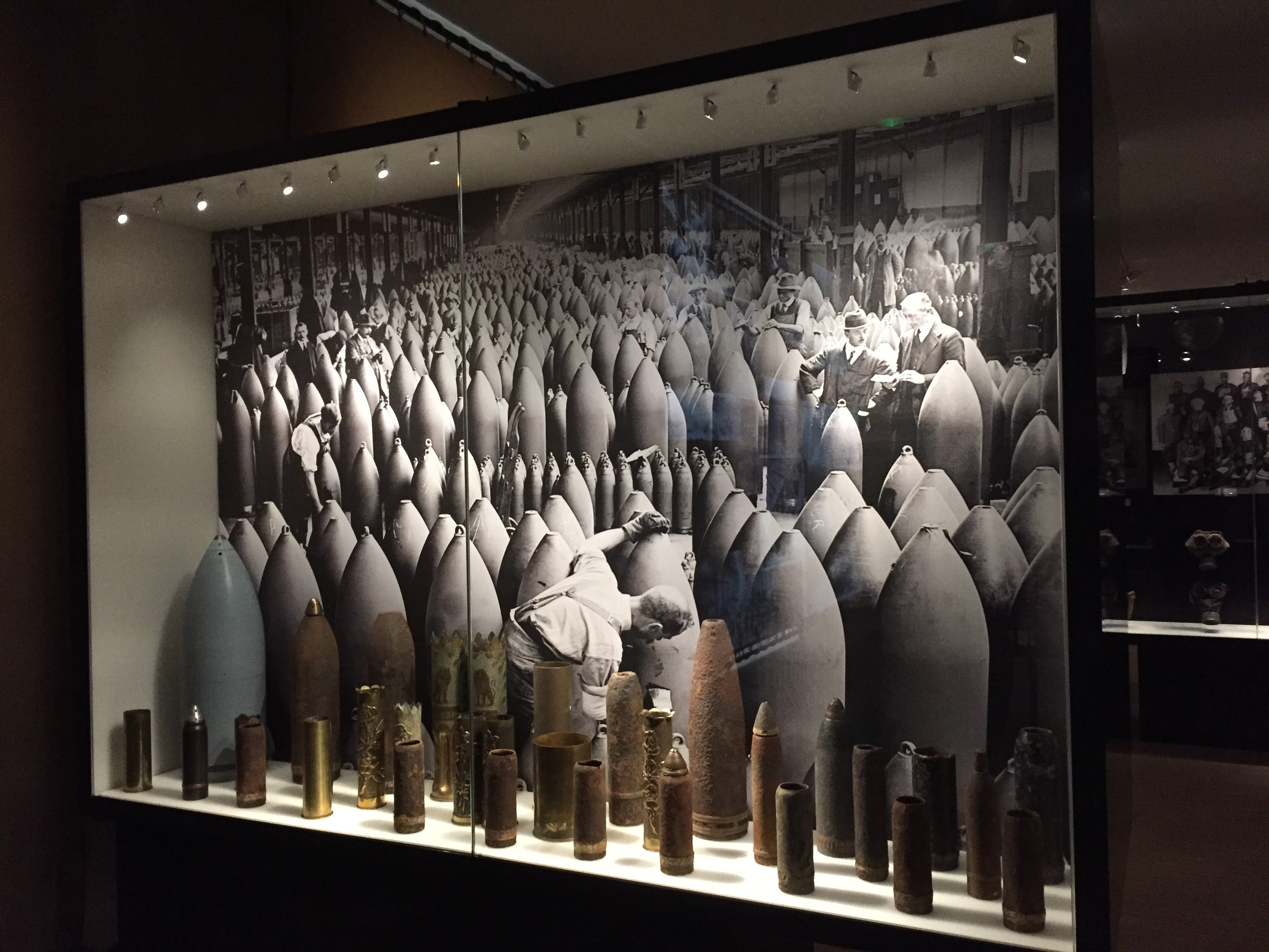 Obuses de la Primera Guerra Mundial, algunos convertidos en obras de arte por soldados; de fondo, fotografía de una fábrica de obuses.. Exposición permanente de la Casa de la Historia Europea en Bruselas.